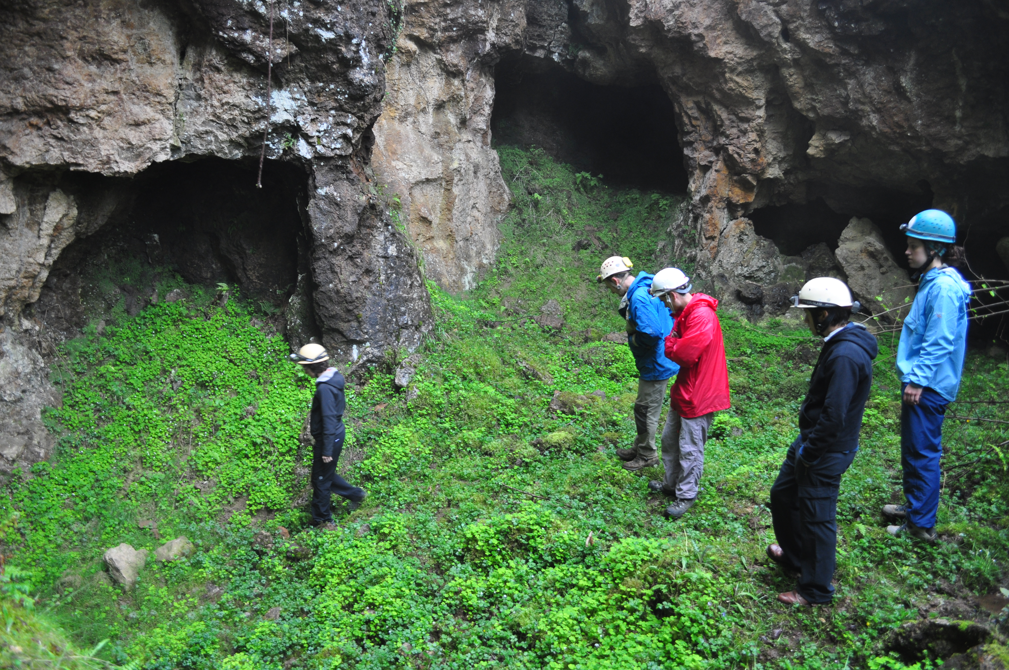 Bioespeleologoak Urallaga Sistemako kobazulo batean (Trianoko mendiak, Galdames).